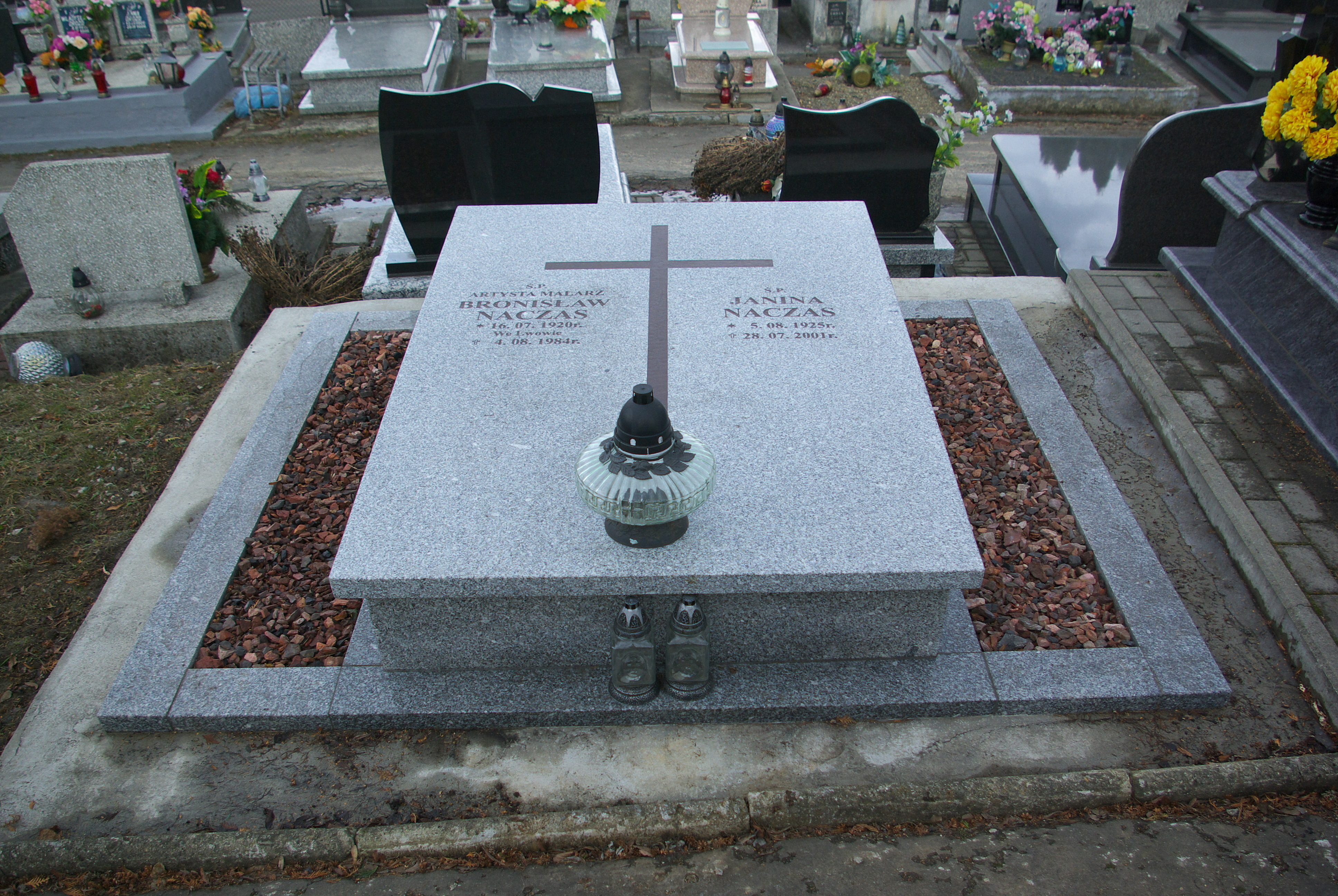 Nagrobek Bronisława i Janiny Naczas na Cmentarzu Centralnym w Sanoku.